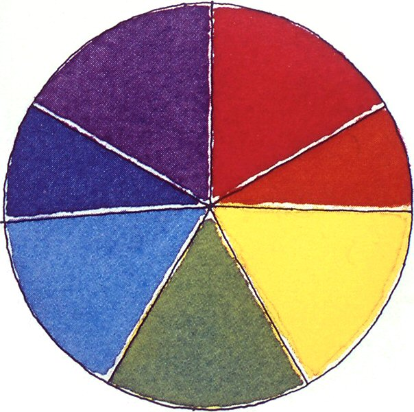 5. - Newtons farvecirkel. - Omkring år 1700 havde Newton spaltet sollyset og fundet at det bestod af disse 7 farver